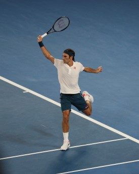 2019 Australian Open